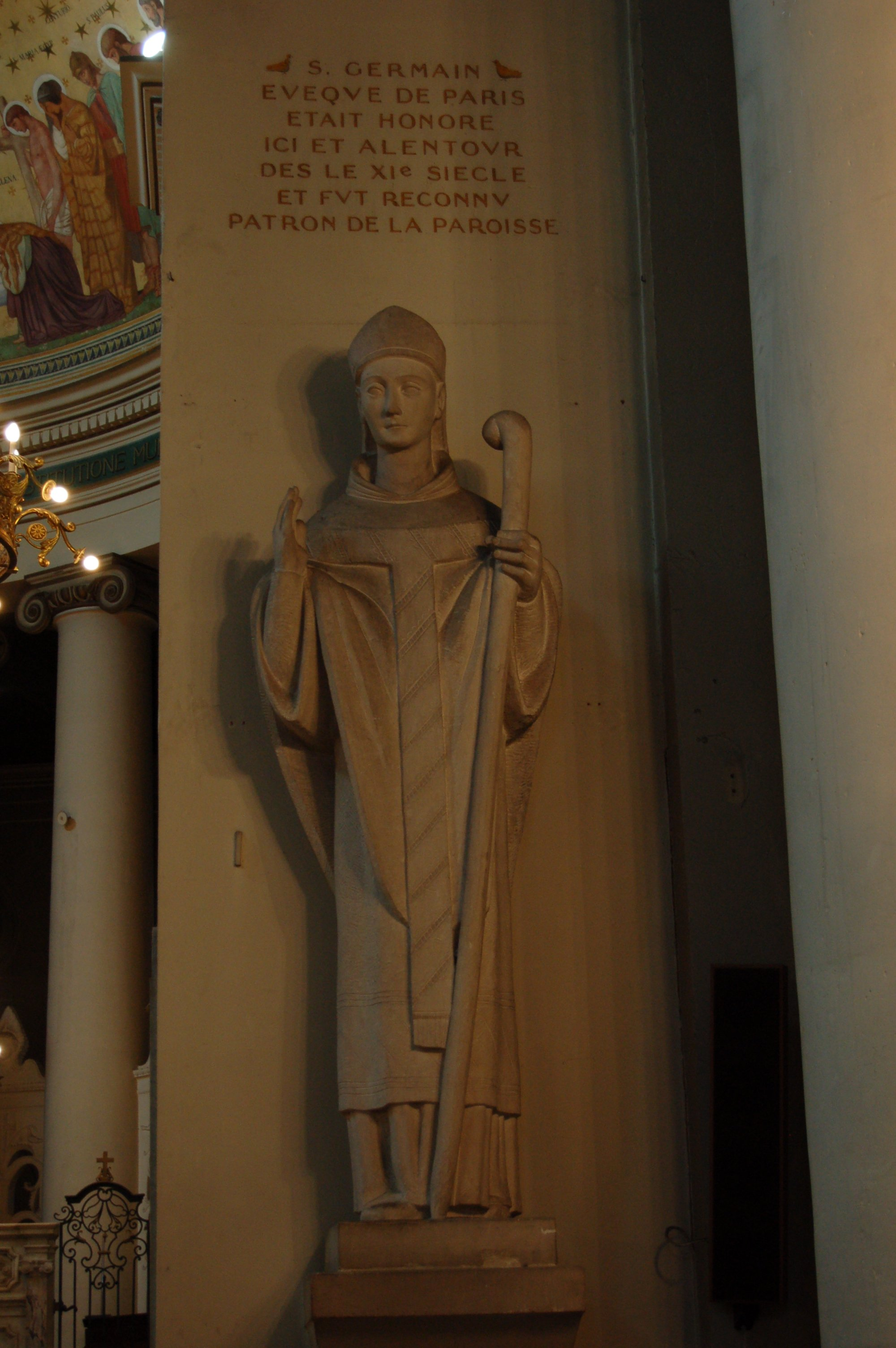 Saint Germain de Paris, statue dans l'église de Saint-Germain-en-Laye